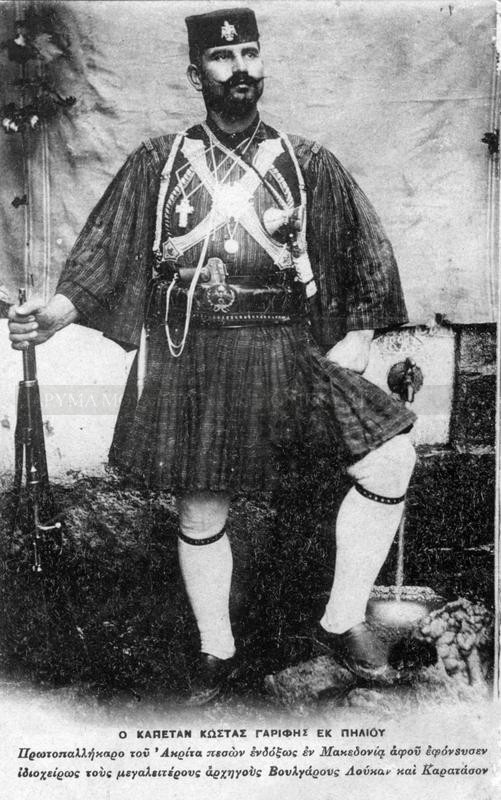 Гръцкият андартски капитан Константинос Гарефис.